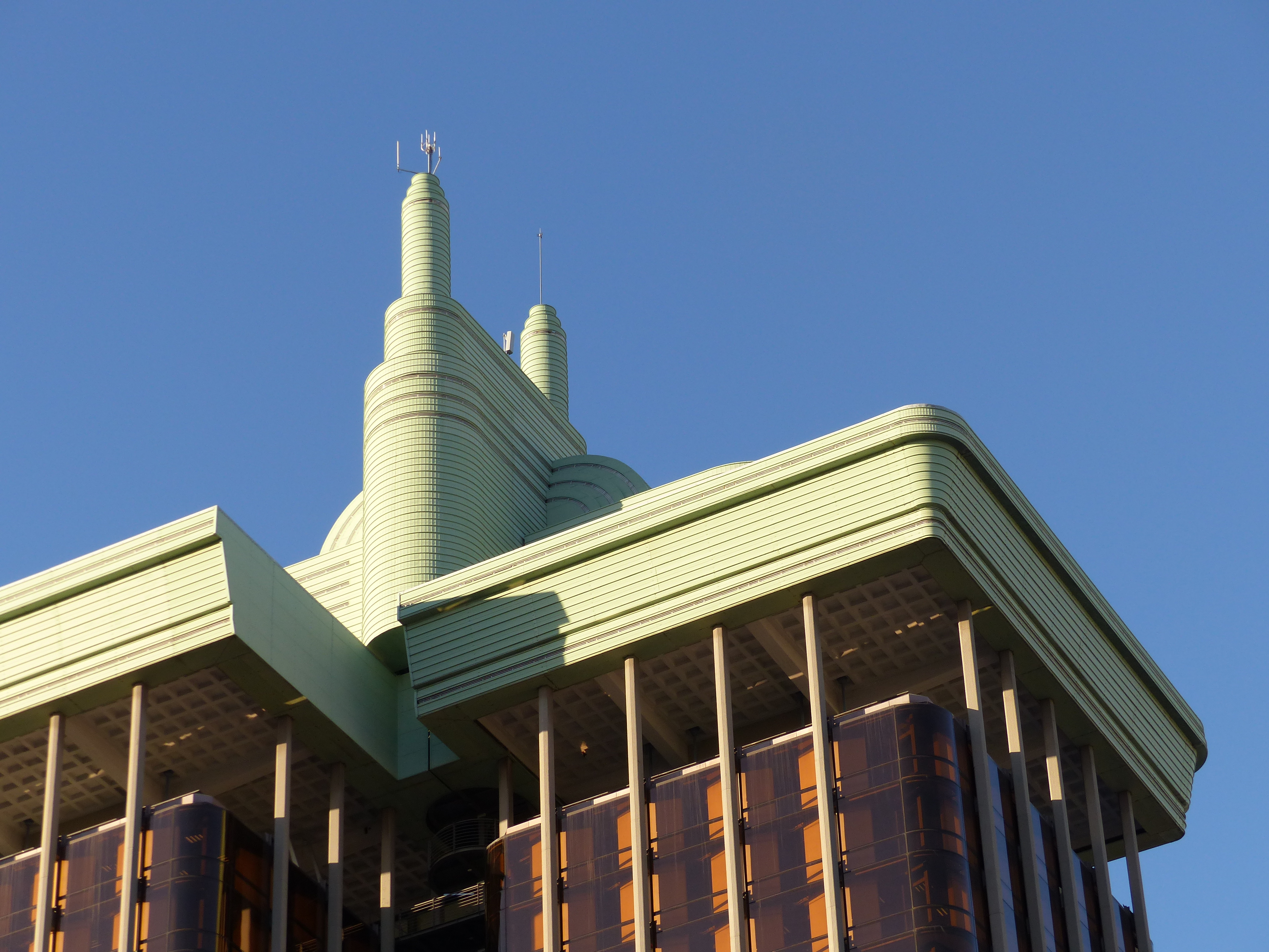 Techo de las Torres de Colón.